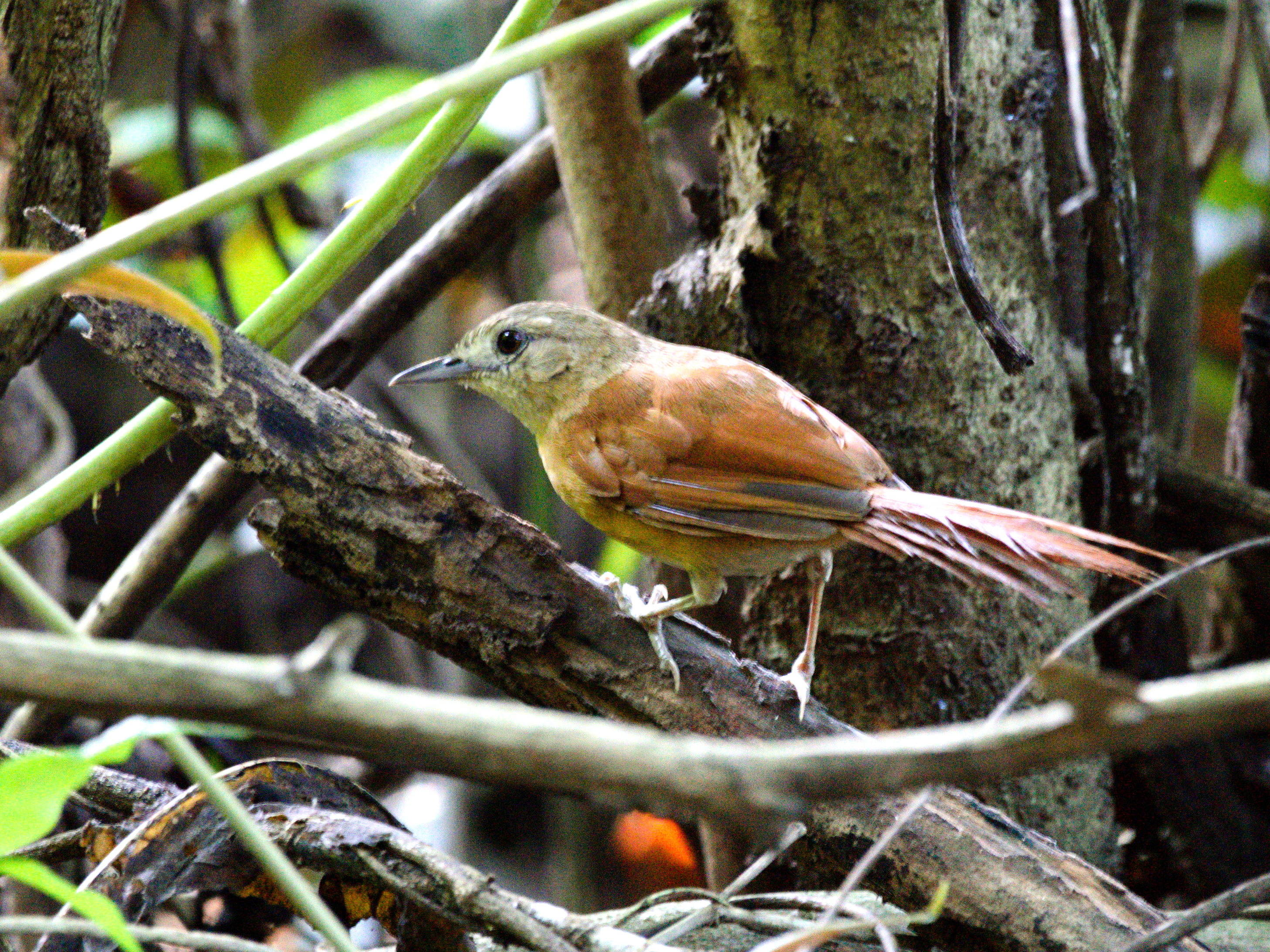 Synallaxis albilora en Los Tres Gigantes, Alto Paraguay